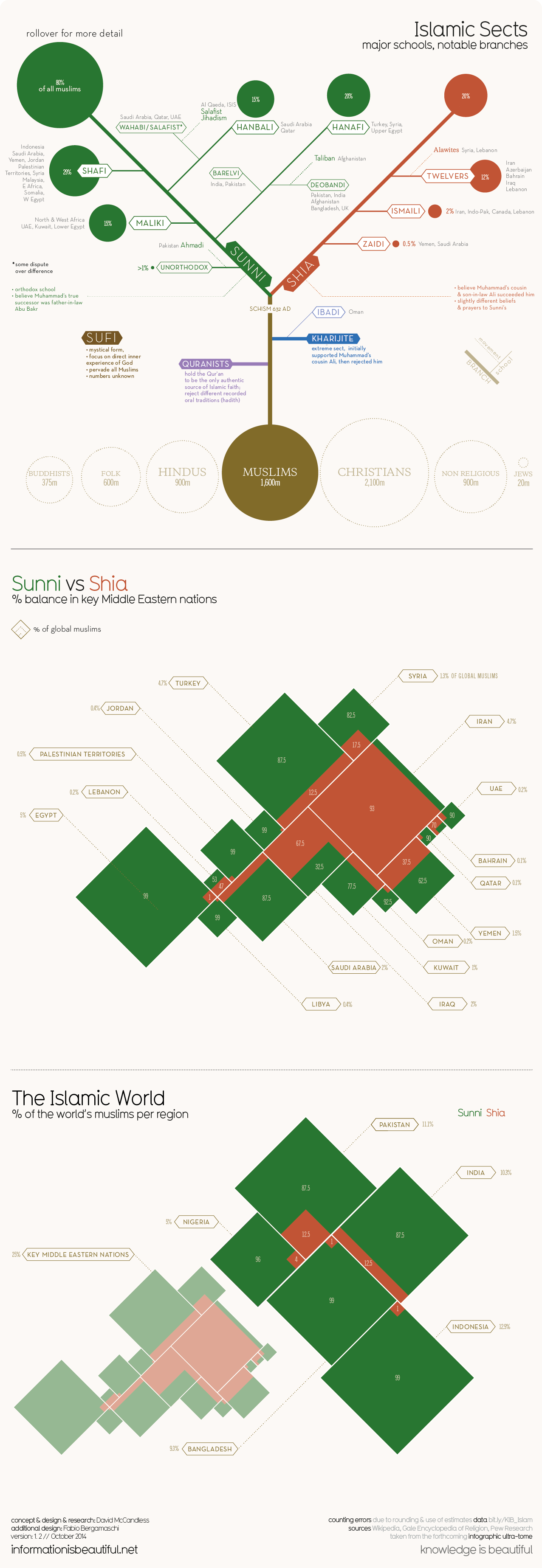 Scoli juridice si grupuri religioase islamice